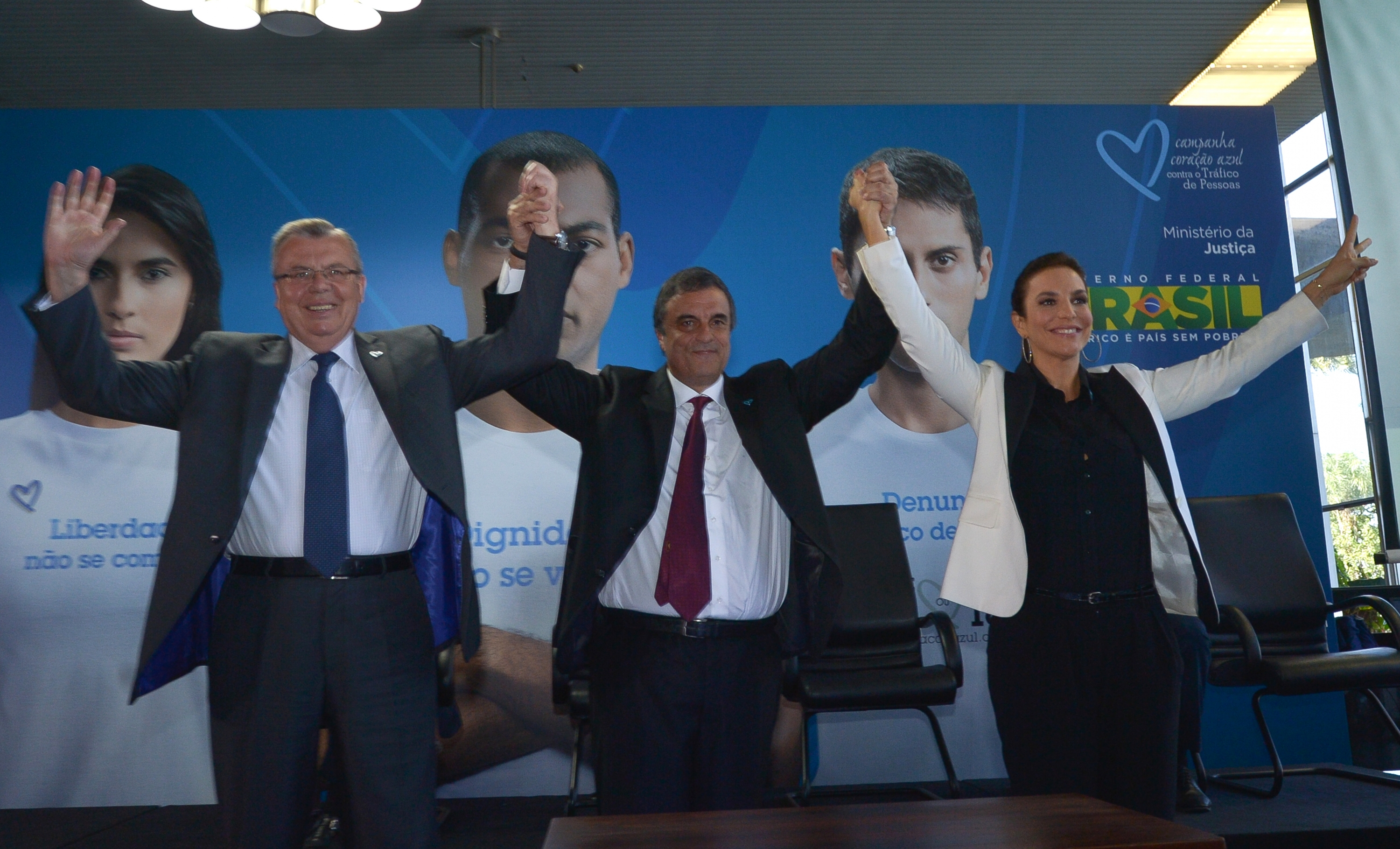 O Ministério da Justiça e o Escritório das Nações Unidas sobre Drogas e Crime (Unodc) lançam campanha Coração Azul contra o tráfico de pessoas. Participam da cerimônia o diretor-executivo do Unodc, Yury Fedotov; o ministro da Justiça, José Eduardo Cardozo; e a cantora Ivete Sangalo, nomeada embaixadora da campanha no Brasil.